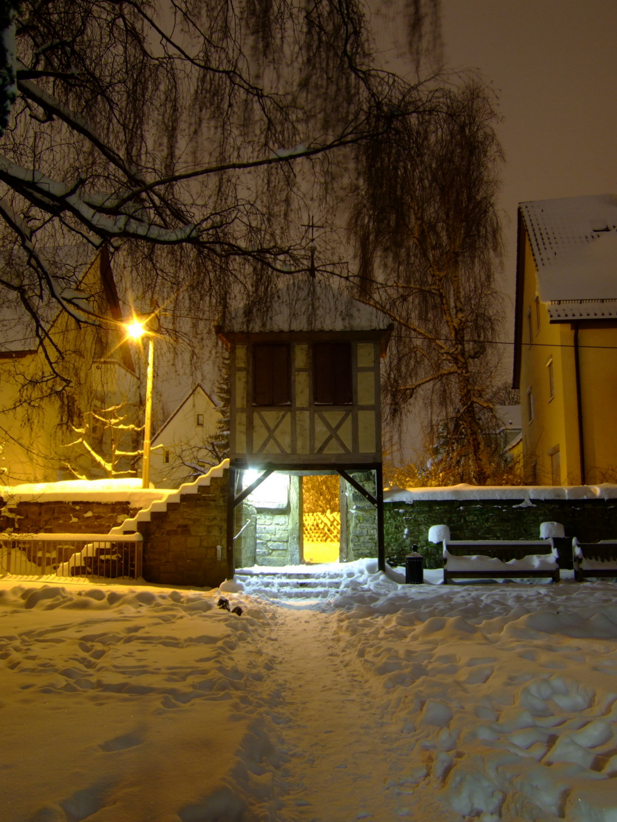 Das Lichtbild zeigt das Pfarrgartenhäusle mit einem Teil der ehemaligen Ortsmauer von Weilimdorf. Photo aufgenommen im Januar 2007 durch Benutzer MBL. Eigene Aufnahme.